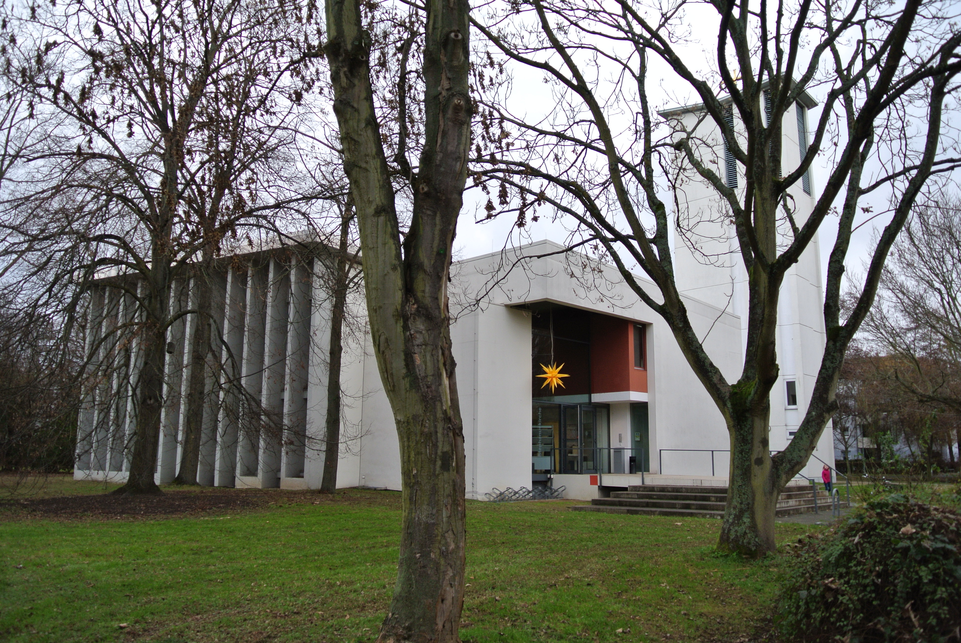 Evangelische Stephanuskirche in Frankfurt-Unterliederbach von 1964, Architekt Ernst Görcke, Südwestansicht